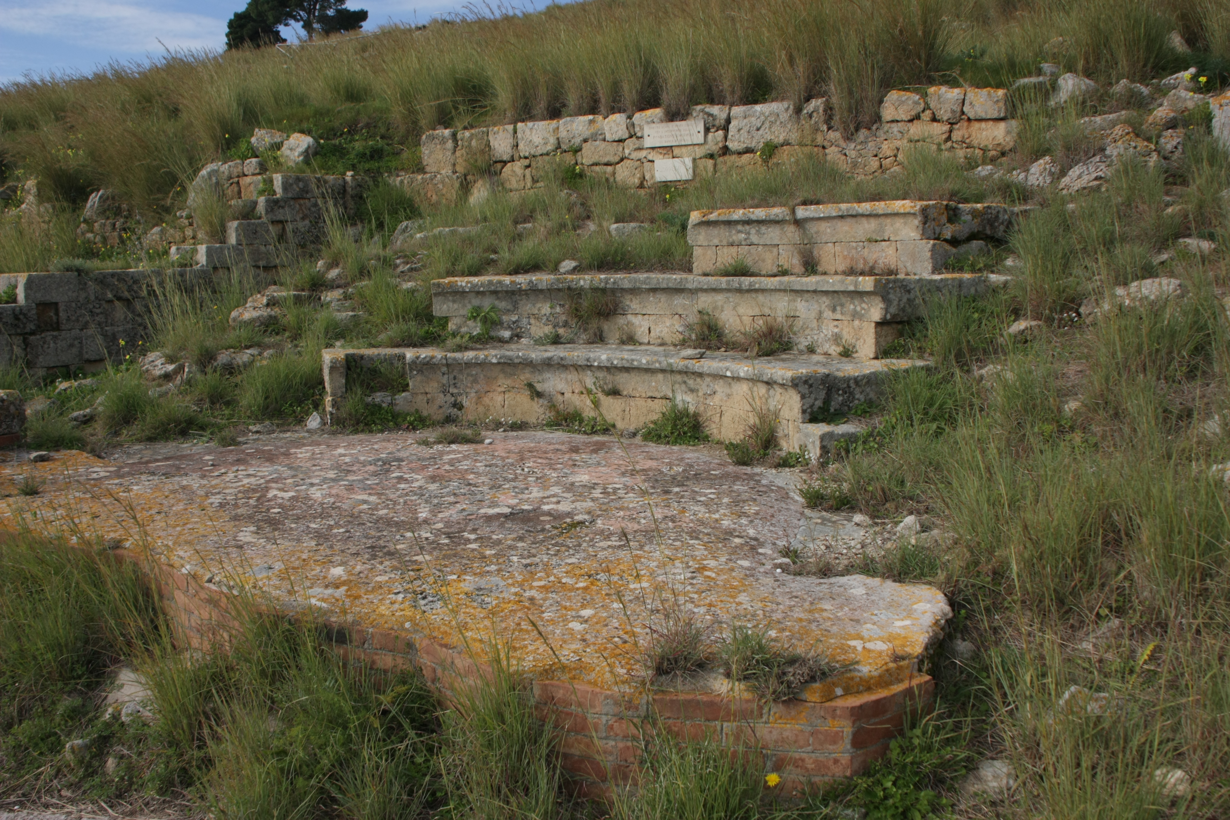 Bouleterion di Solunto